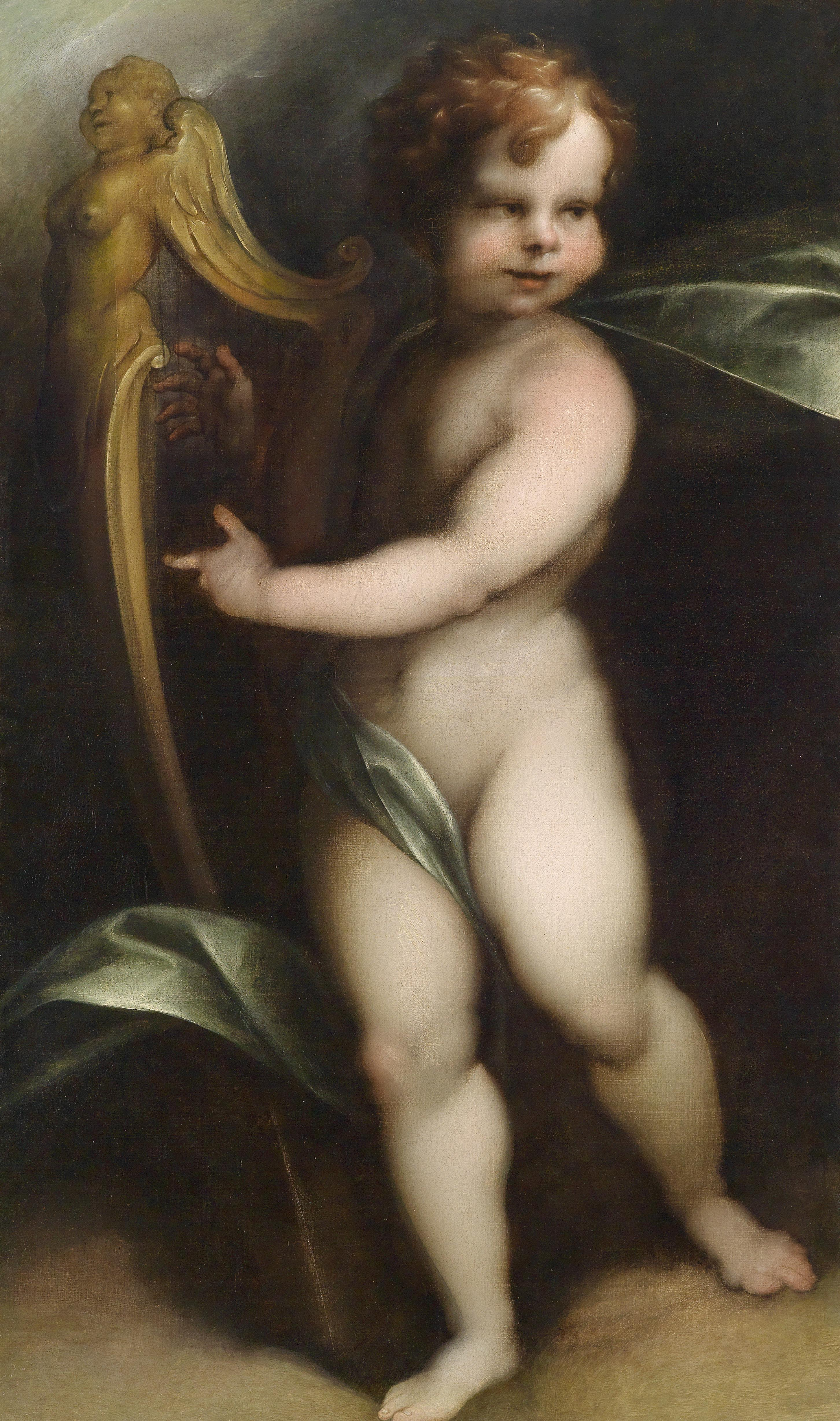 Lyraspielender Putto